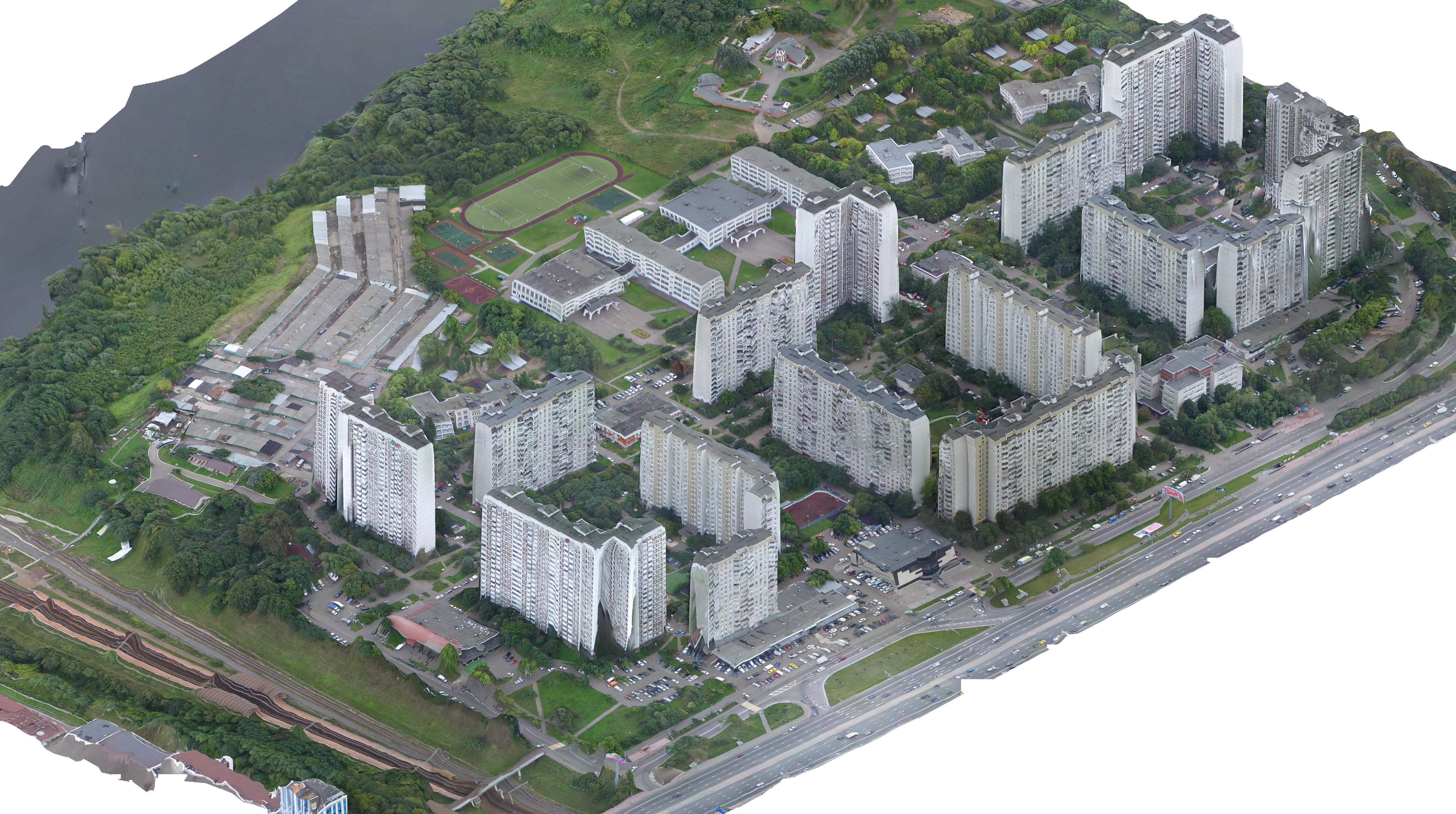 Сабурово. Ортофото под углом, сгенерировано по фотографиям